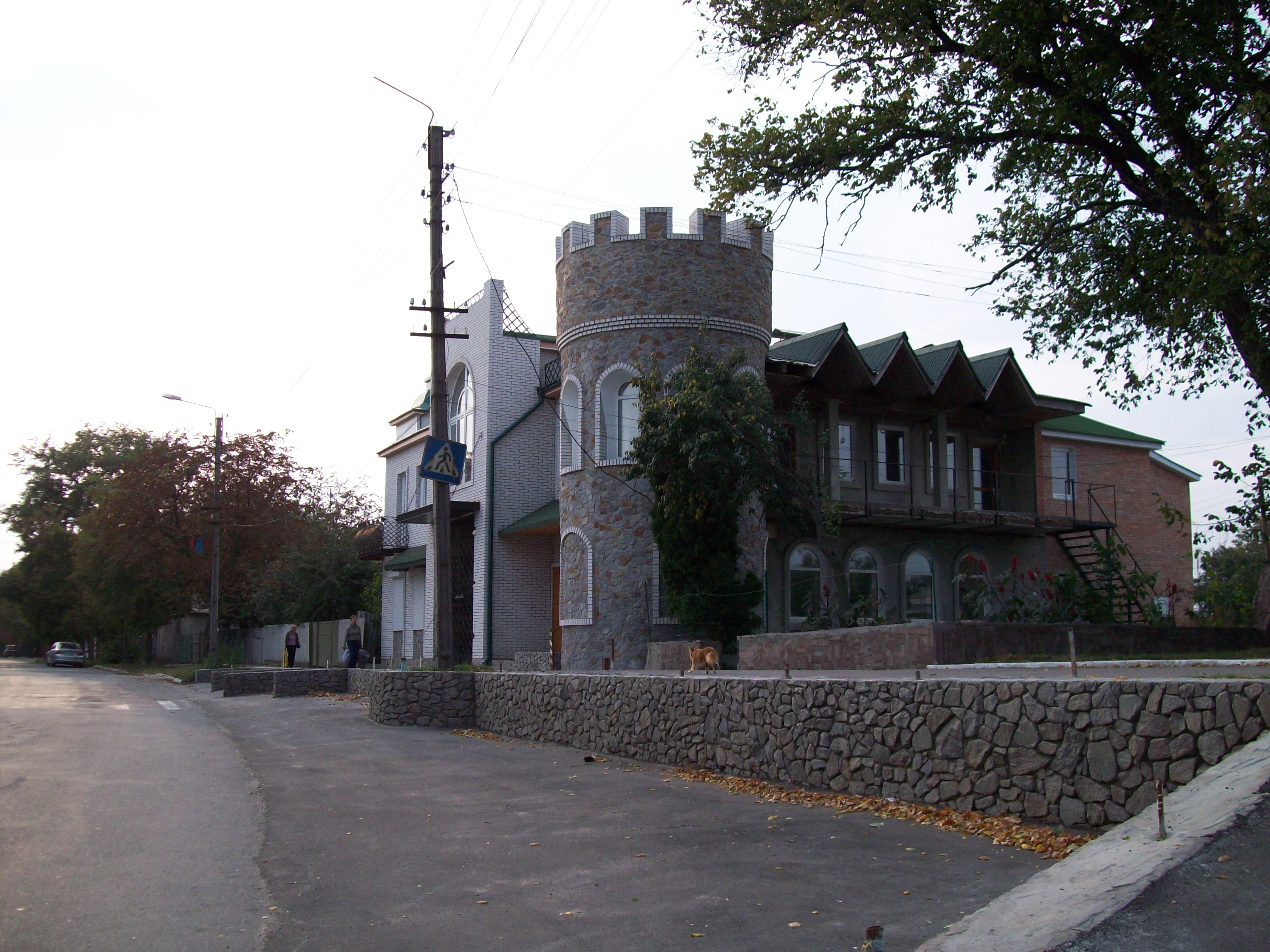 Хрольський спуск